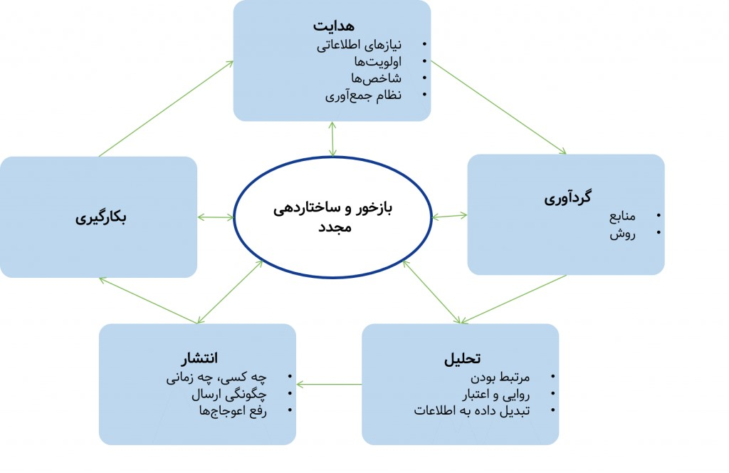 بکارگیری راهنمای پنج مرحله‌ای برای استقرار نظام هوشمندی استراتژیک